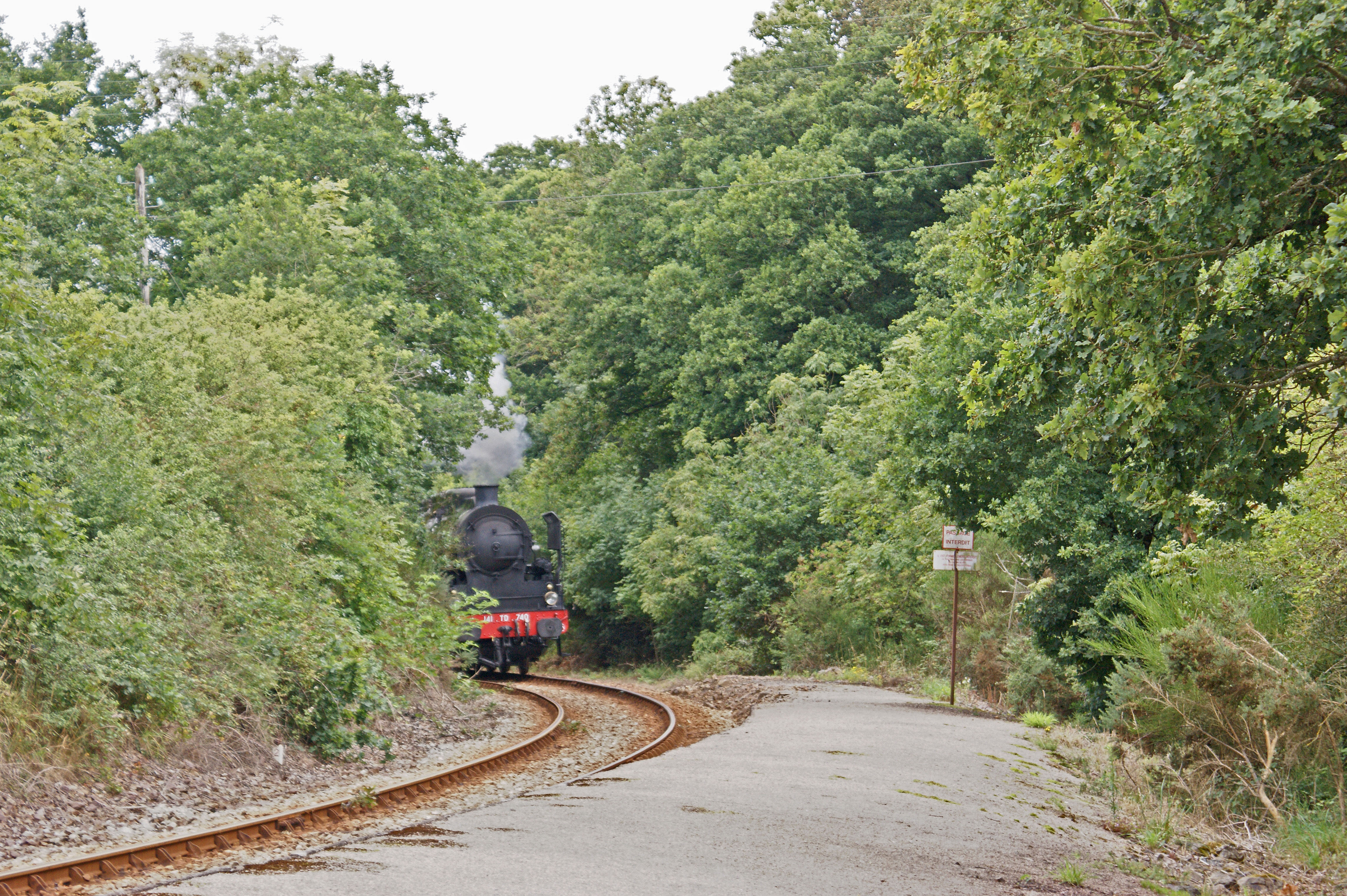 Vu du bout du quai et la voie en direction de Paimpol. La locomotive 141 TD 740 de la Vapeur du Trieux va passer sans marquer l'arrêt.